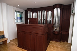 Die Orgel im Andachtsraum von Orgelbau Verschueren (16 Register, III/P, 2007)